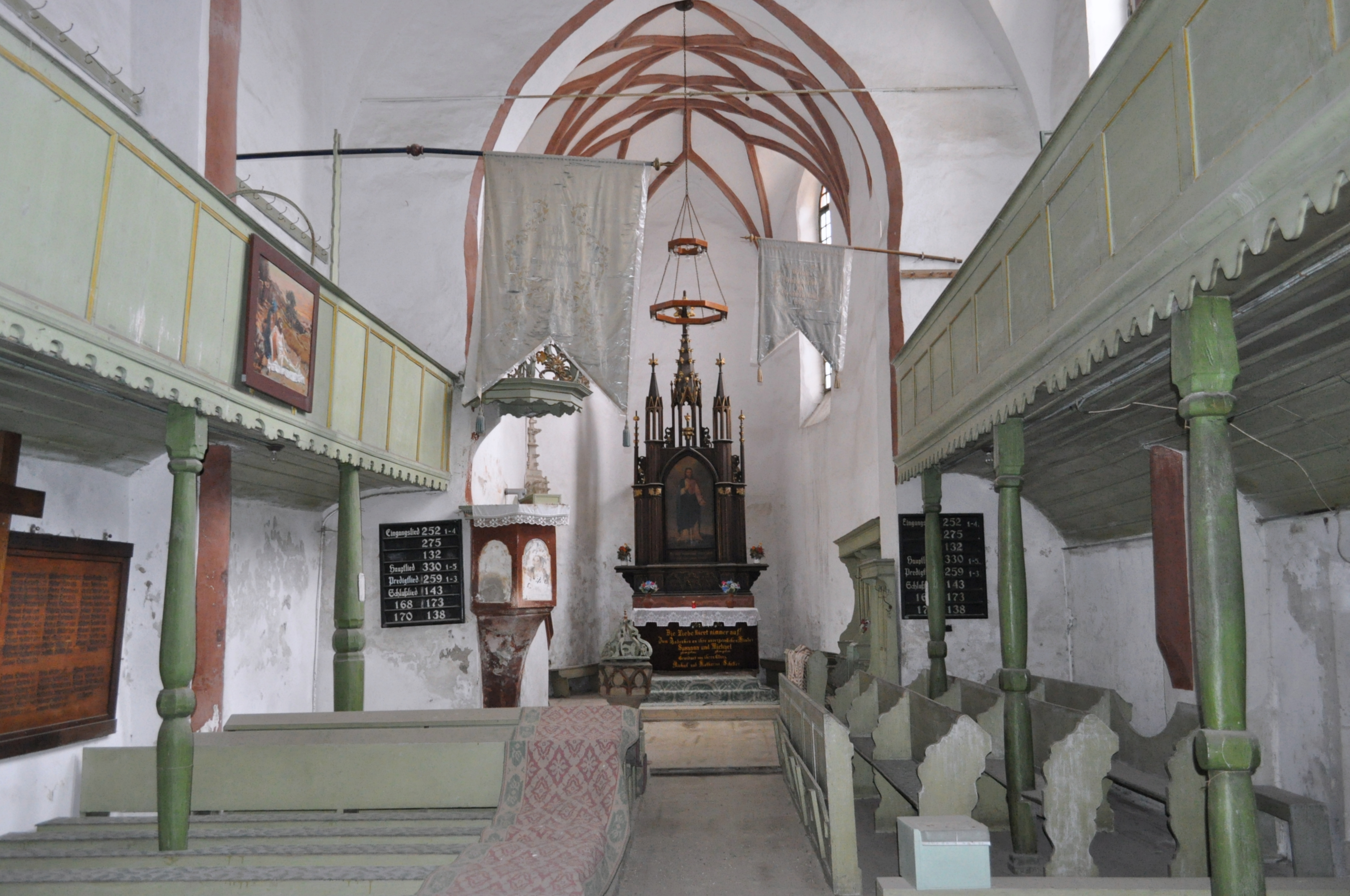 Biserica evanghelică fortificată, sat TÂRNAVA; comuna TÂRNAVA, județul Sibiu 01